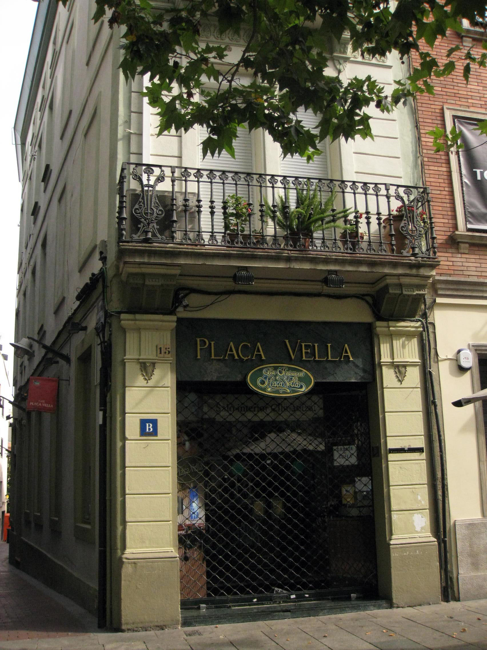 Casa Fabra, a la plaça Vella núm. 15, fent cantonada amb el carrer de Mosterol (Terrassa). Edifici eclèctic de final del segle XIX. Vista dels baixos, ocupats per un edifici de restauració.